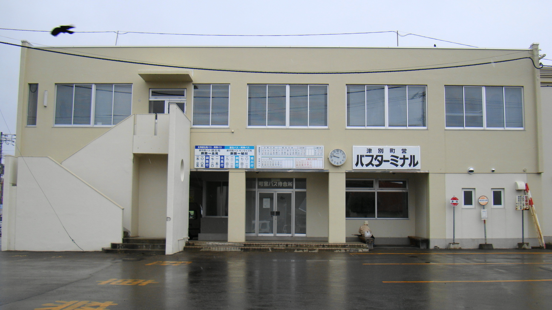 Tsubetsu bus terminal